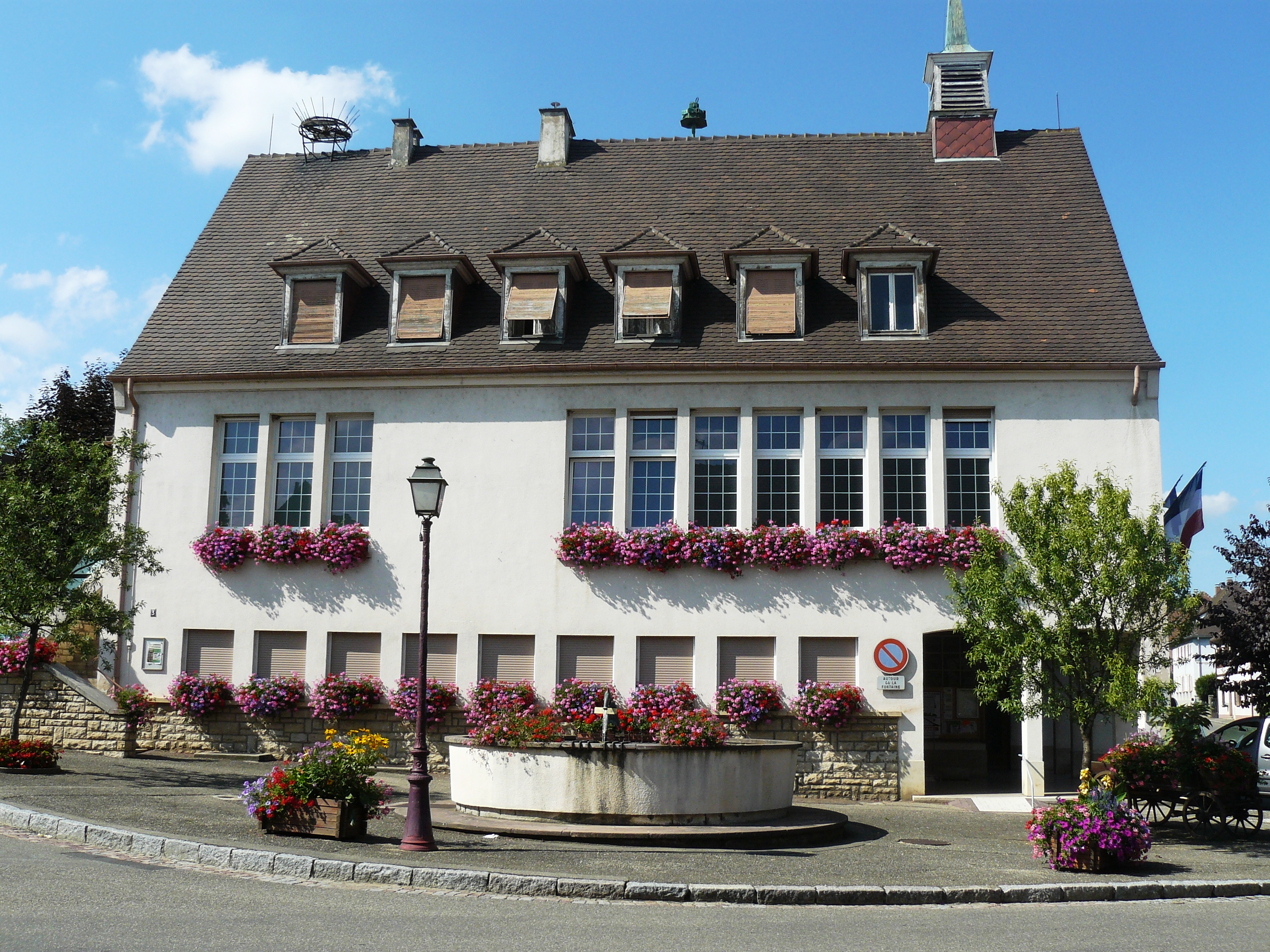 La mairie de Mittelwihr